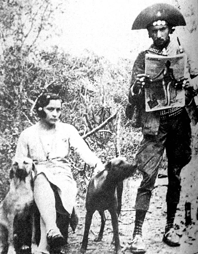 Retratos do cangaço: Lampião e Maria Bonita